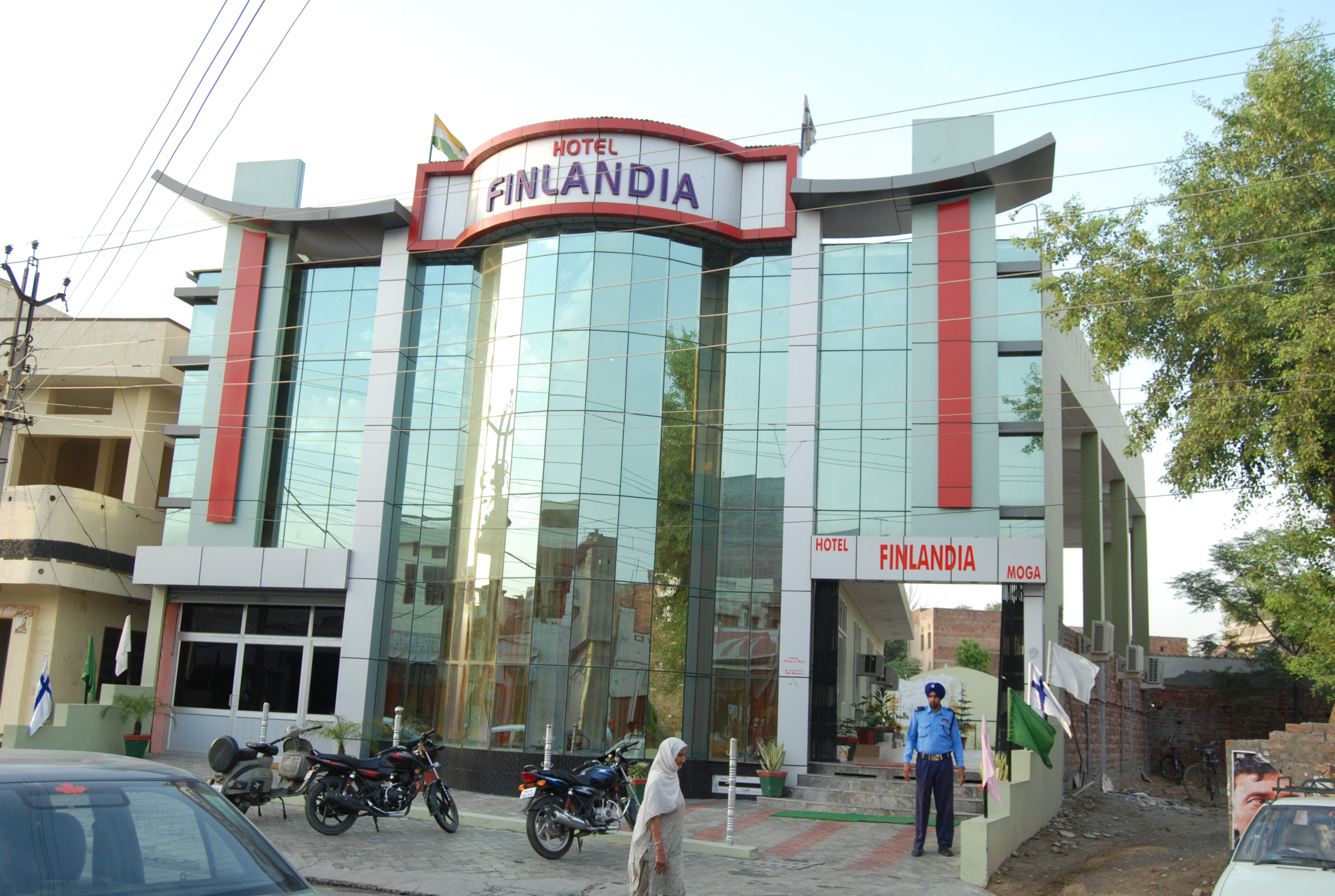 Finlandia hotel & Fun Park,MOGA(Punjab) INDIA